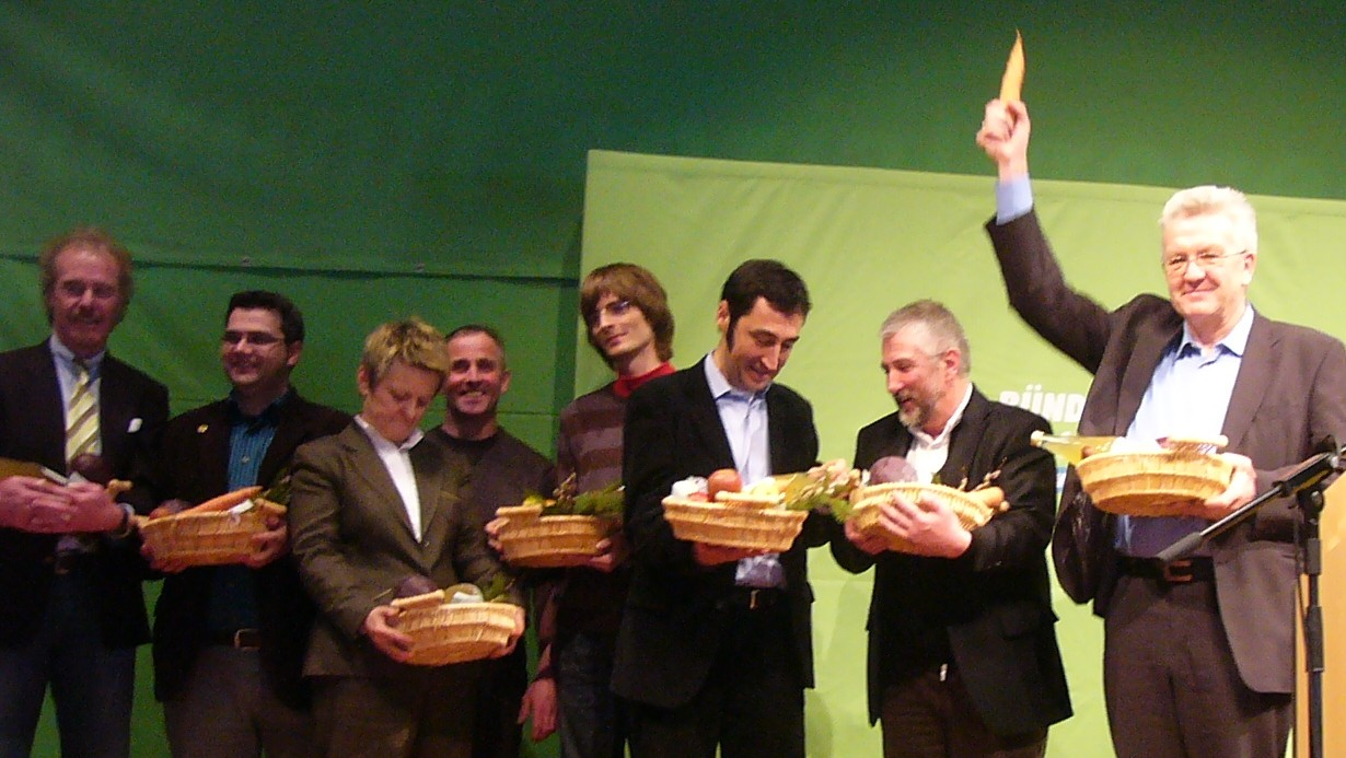 Die Redner des Grünen Politischen Aschermittwochs 2009 in Biberach/Riß und ein Organisator, u.a. Daniel Mouratidis, Arvid Bell, Cem Özdemir, Renate Künast, winfried Kretschmann)